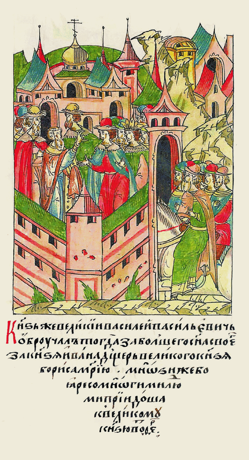 Князь же вели- кий Василий Васильевич обручил тогда старше- го сына своего князя Ивана с дочерью великого князя Бориса Марией. И многие бояре с людьми приш- ли к великому князю в Тверь.